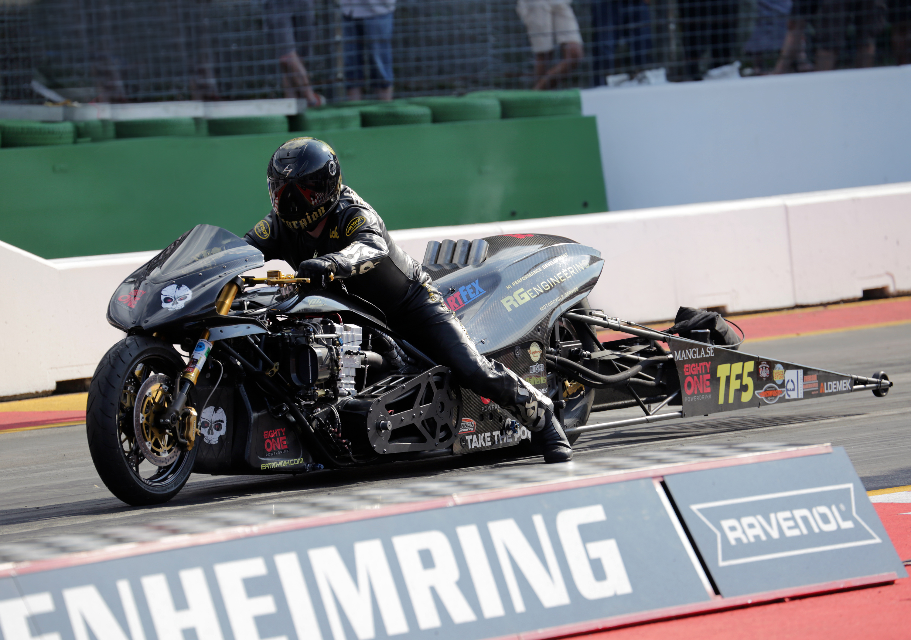 FIM / Top Fuel / Rider: Rikard Gustafsson (SWE) / NitrolympX 2019